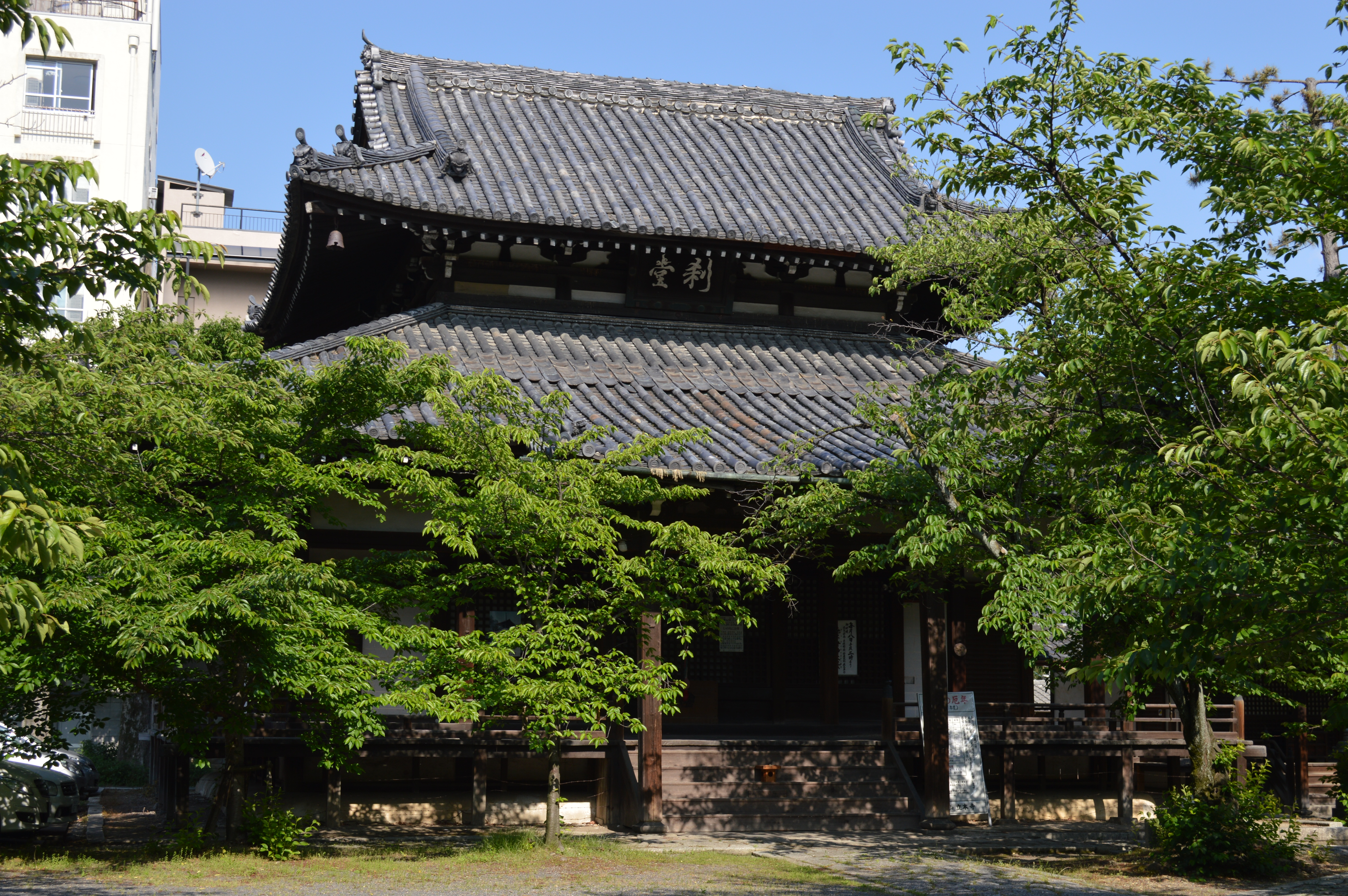 京都府京都市上京区一番町 日蓮宗本山立本寺 刹堂（鬼子母神堂）